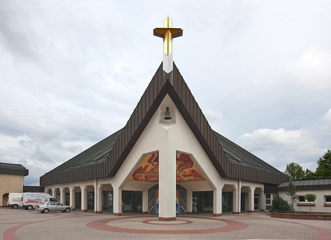 St. Bonifatius in Leinefelde-Süd. Baubeginn 1988 noch zu DDR-Zeiten, 1993 geweiht.